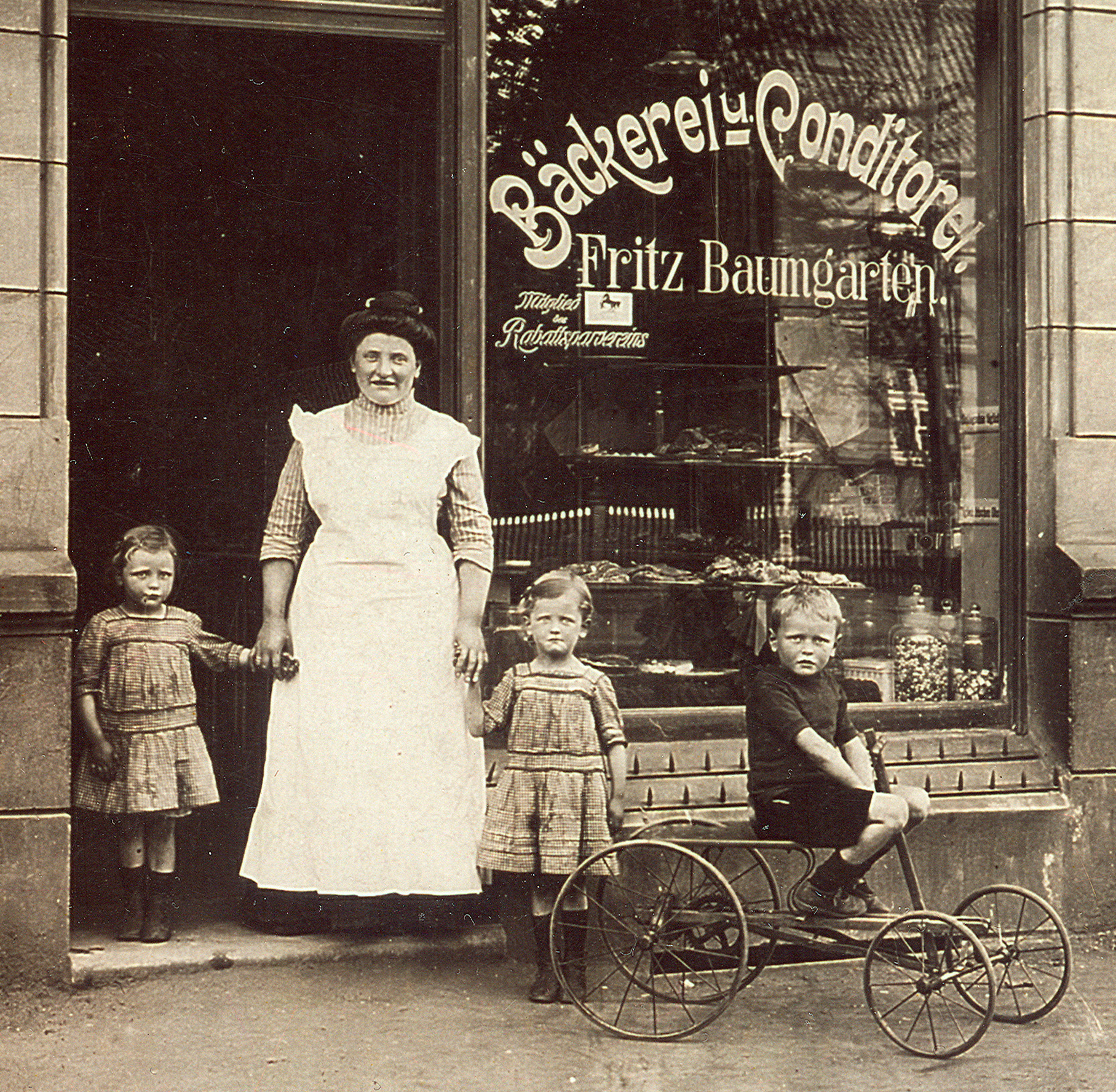 Grete Hoell (ganz links, als kleines Mädchen) und ihre (seinerzeit) beiden Geschwister vor der Bäckerei und Conditorei Fritz Baumgarten (Mitglied des Rabattsparvereins) in der damaligen Herrenhäuser Straße 48 (heute: Stöckener Straße 21); der Junge im Vordergrund sitzt auf einem sogenannten Holländer.